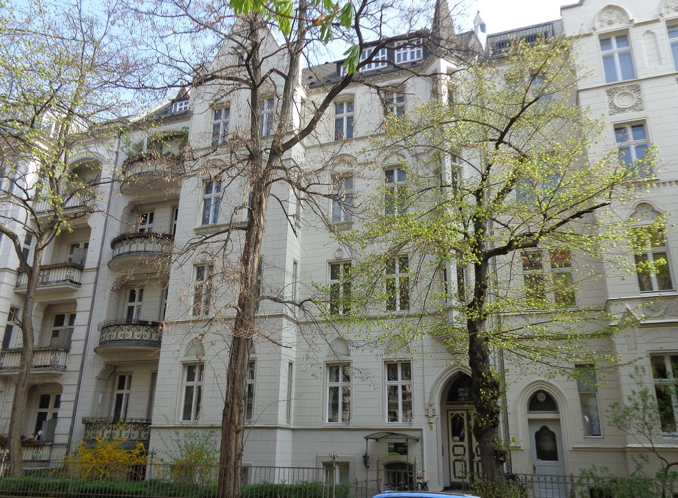 Baudenkmal Berlin-Schöneberg Menzelstrasse 30